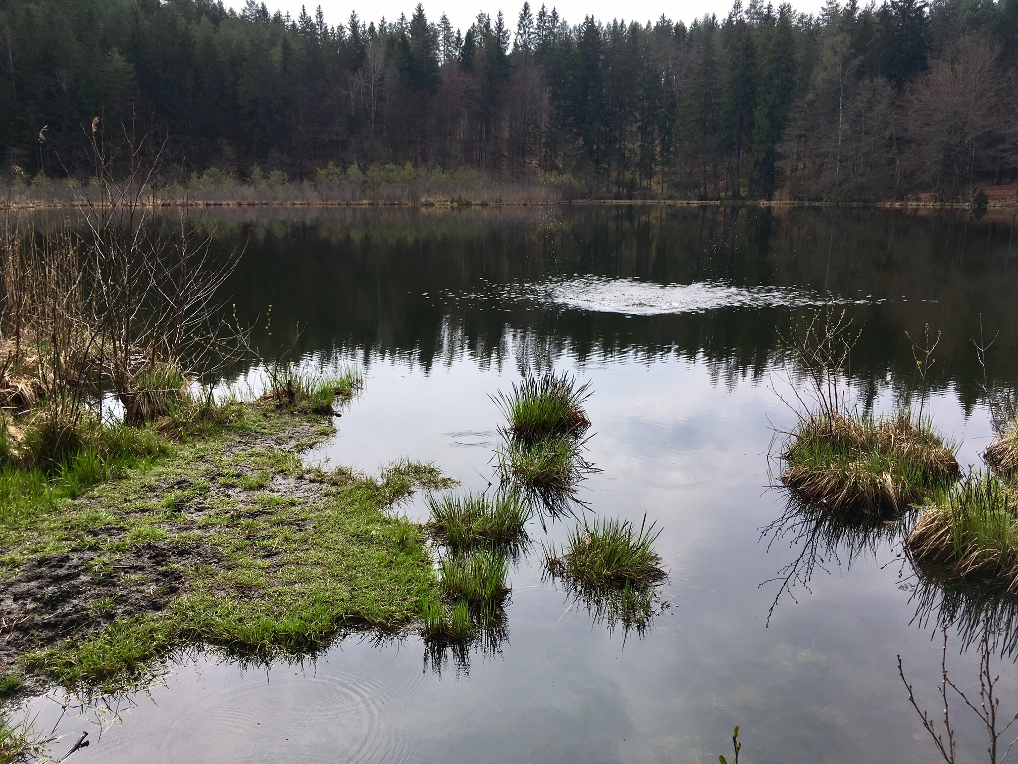 Oberer Spintikteich in der Gemeinde Keutschach, Klagenfurt Land, Kärnten, Österreich, Europäische Union